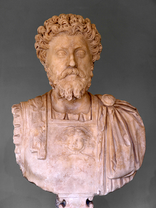 Marcus Aurelius (121-180)